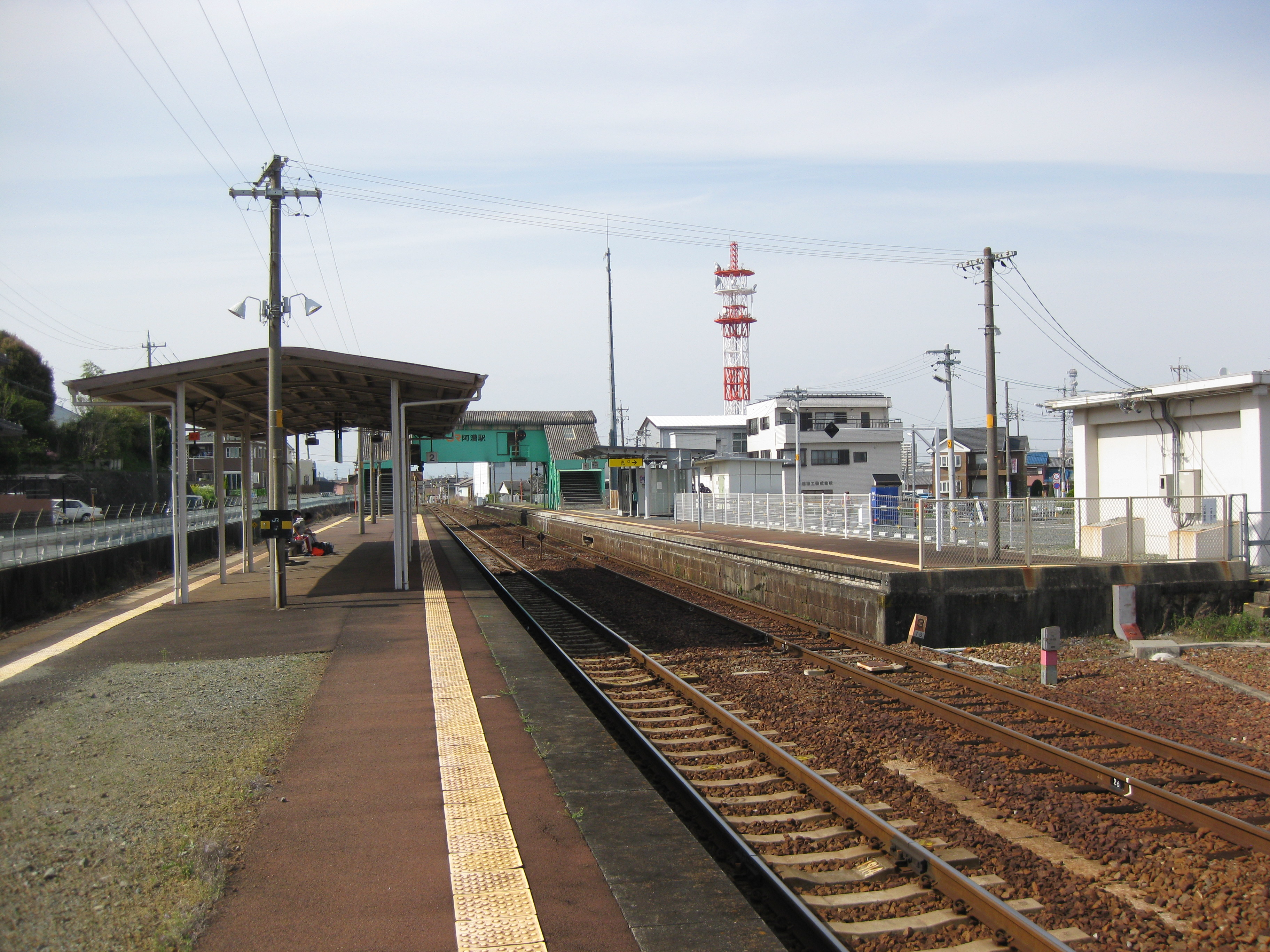 阿漕駅プラットホーム